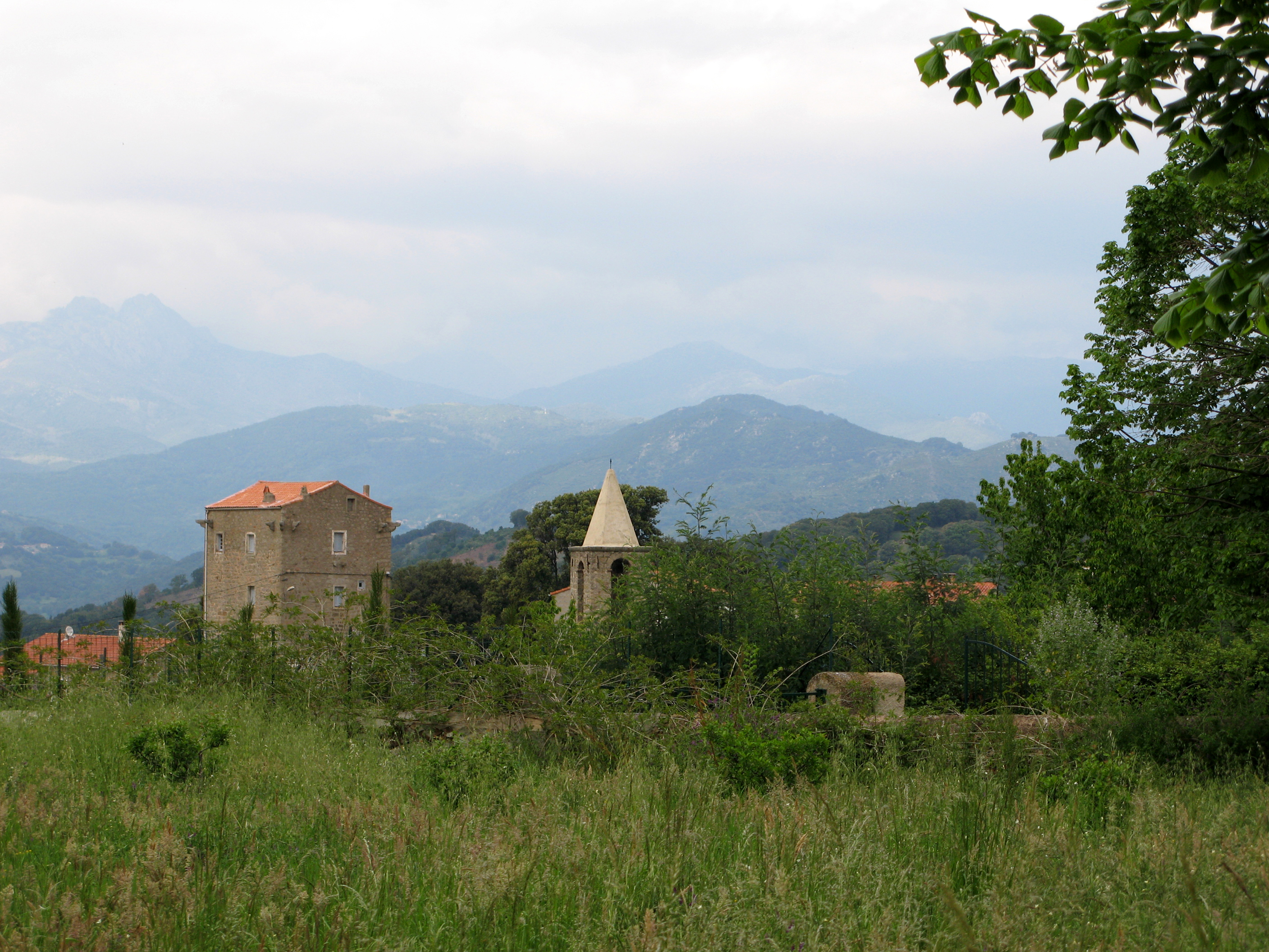 Petreto-Bicchisano (Corse-du-Sud, France) - On remarque : le paysage, avec ses importantes différences de niveau : on est bien en montagne ! l'architecture : la maison typique, imposant bloc carré, avec ses longues pierres saillantes à chaque angle, et ses petites fenêtres pour empêcher le vent en hiver et la chaleur en été.